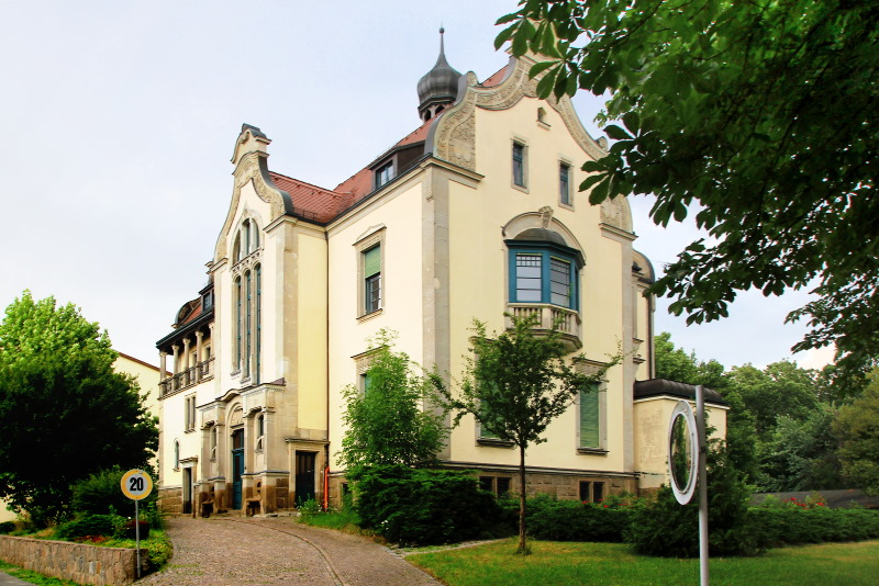 Mädlervilla in Leipzig, Hans-Driesch-Straße 2, vom Leipziger Architekten Julius Zeißig erbaut